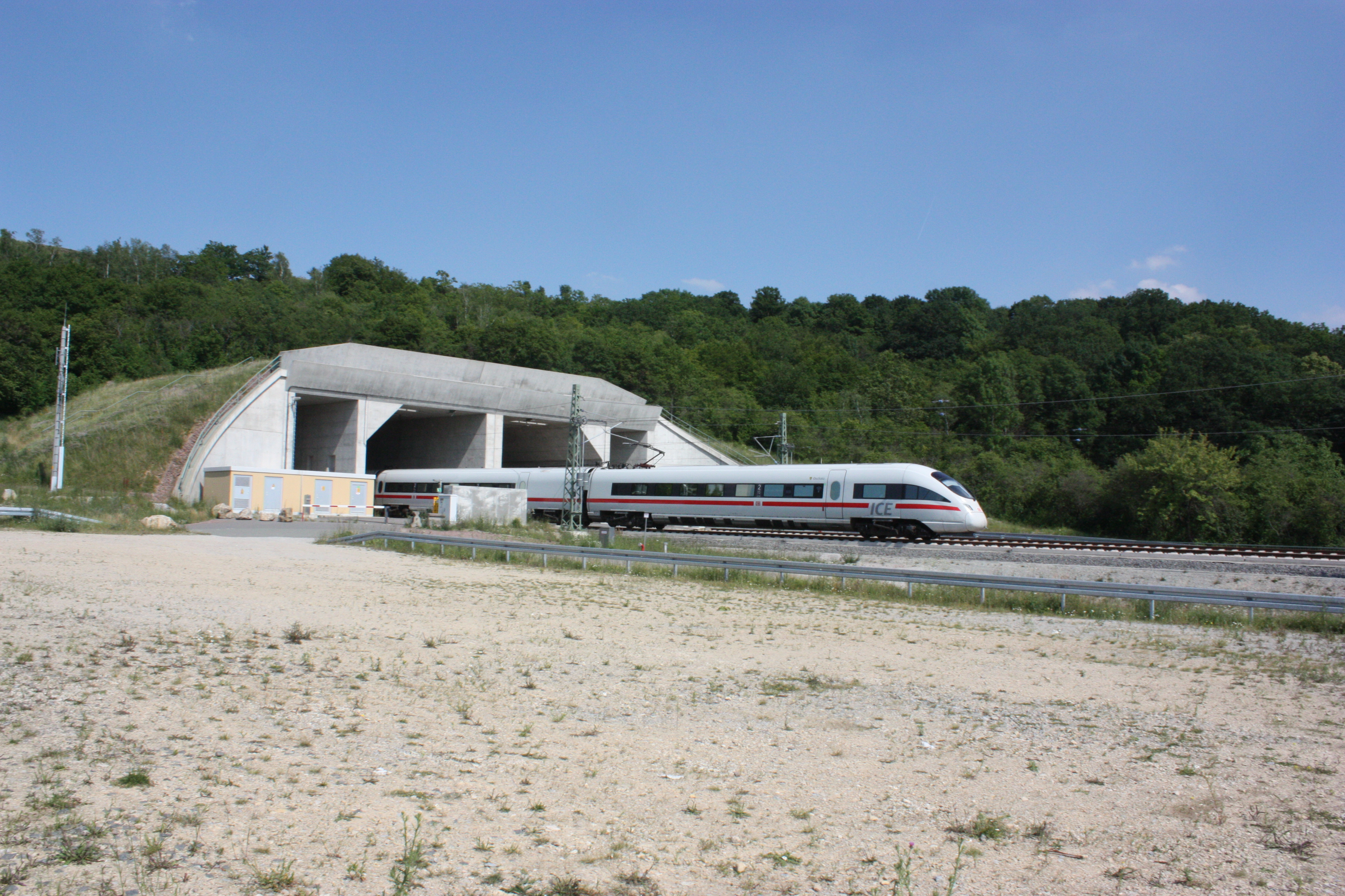 Westportal des Osterbergtunnels mit ausfahrendem ICE T